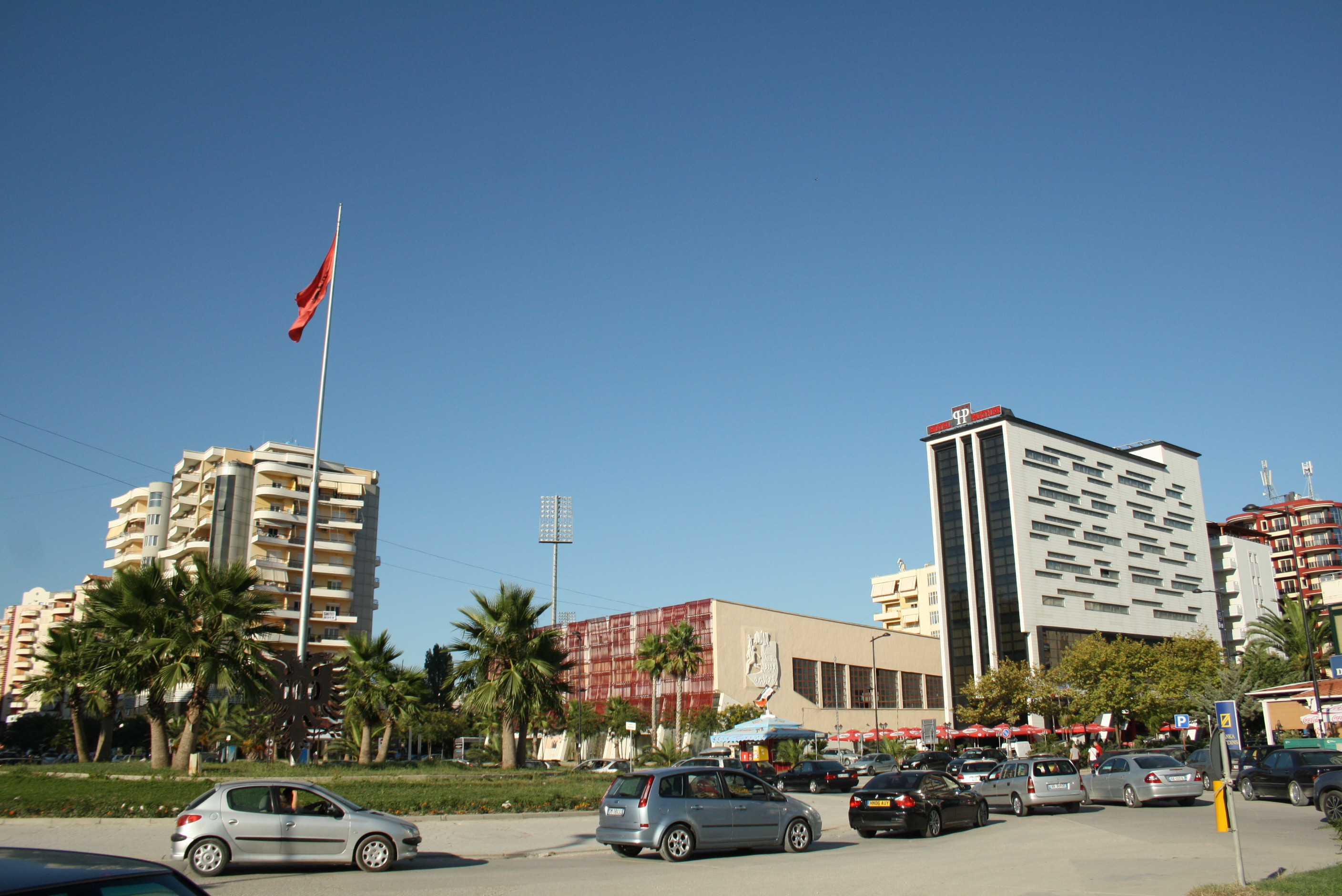 Valona, Qendra Think